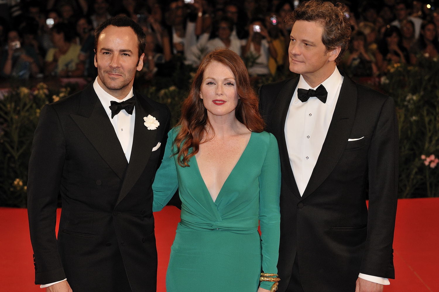 66ème Festival du Cinéma de Venise (Mostra), 10ème jour (11/09/2009) Tapis rouge avec Colin Firth, Julianne Moore, Matthew Goode et le réalisateur Tom Ford pour le film : A sigle Man